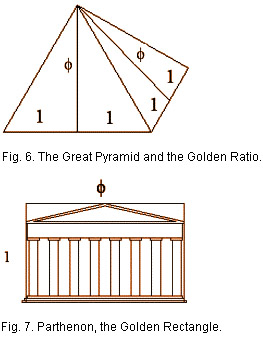 link My personal site Licensing تصنيف:هندسة وصفية